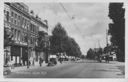 De Oudedijk in Rotterdam. Foto van prentbriefkaart, fotograaf onbekend.